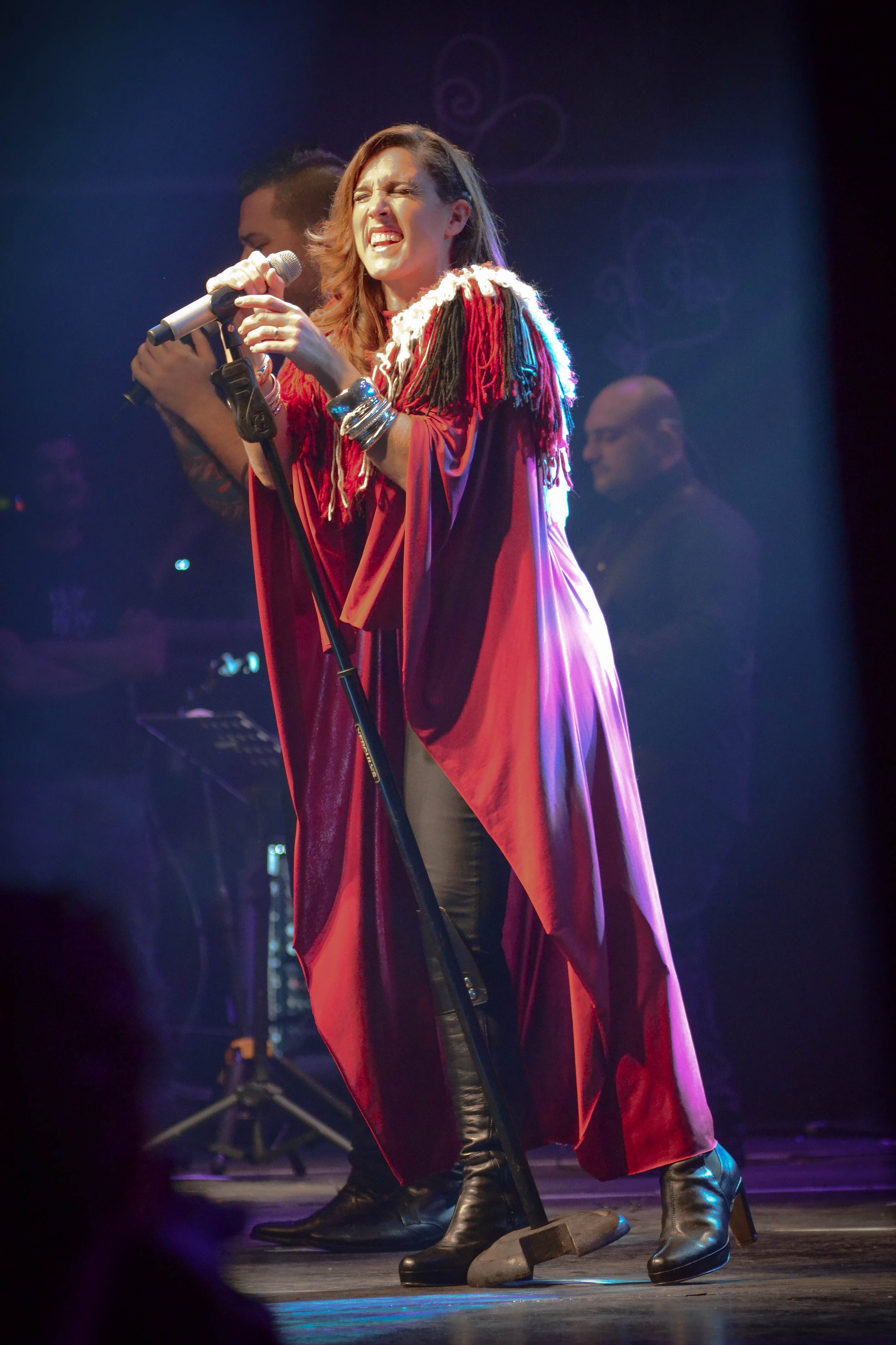 Soledad Pastorutti. Show en Espacio Quality, Córdoba, Argentina.